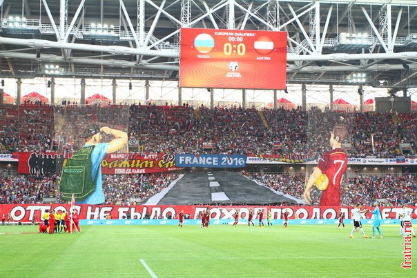 Дорога к Евро-2016